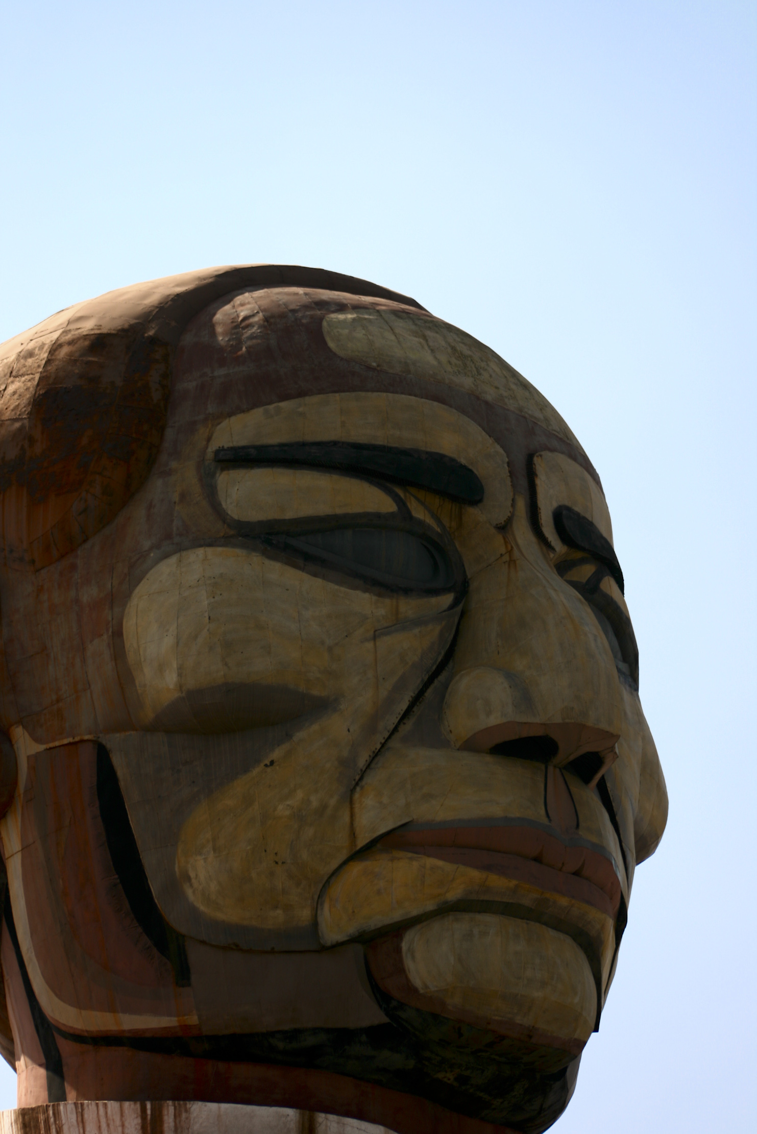 Museo Cabeza de Juarez, México DF